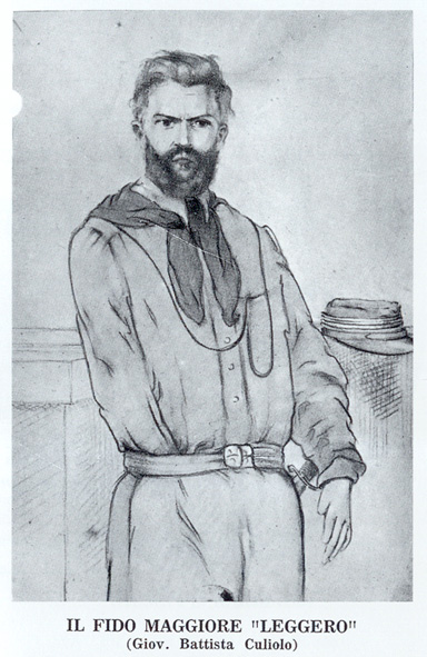 Patriota italiano